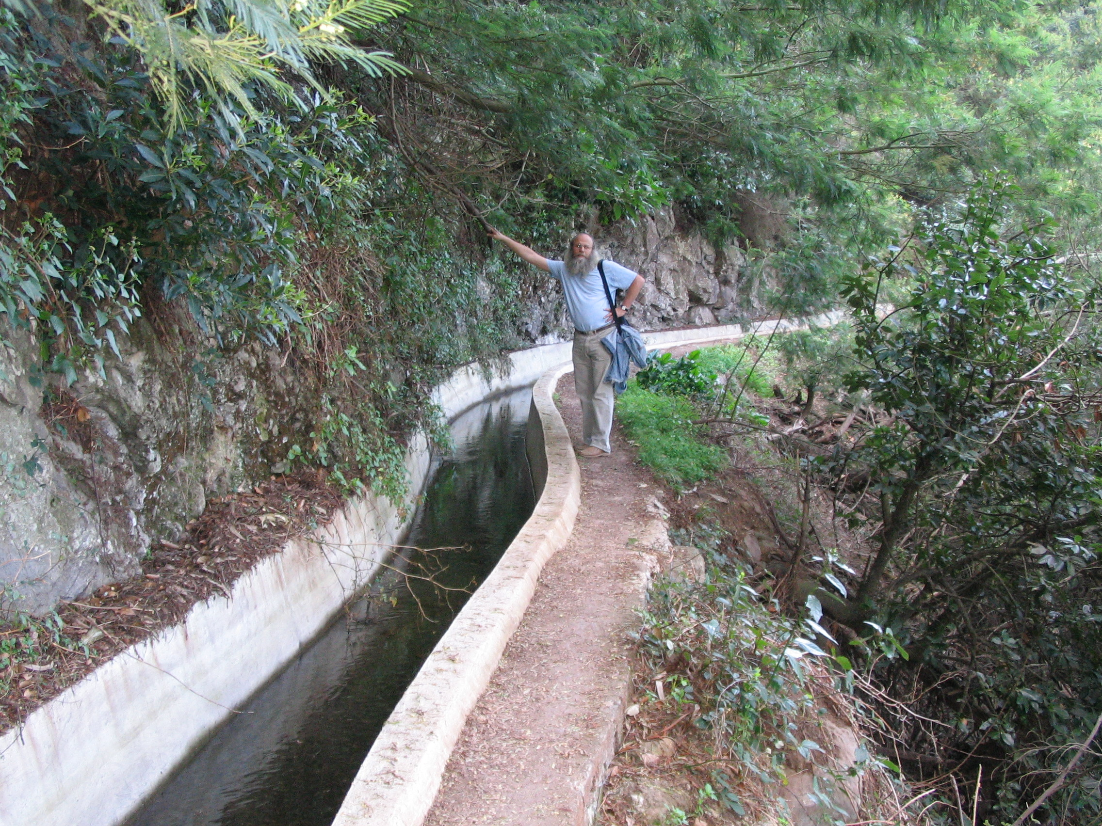 A Levada dos Tornos turistaútja (Monte, Madeira)